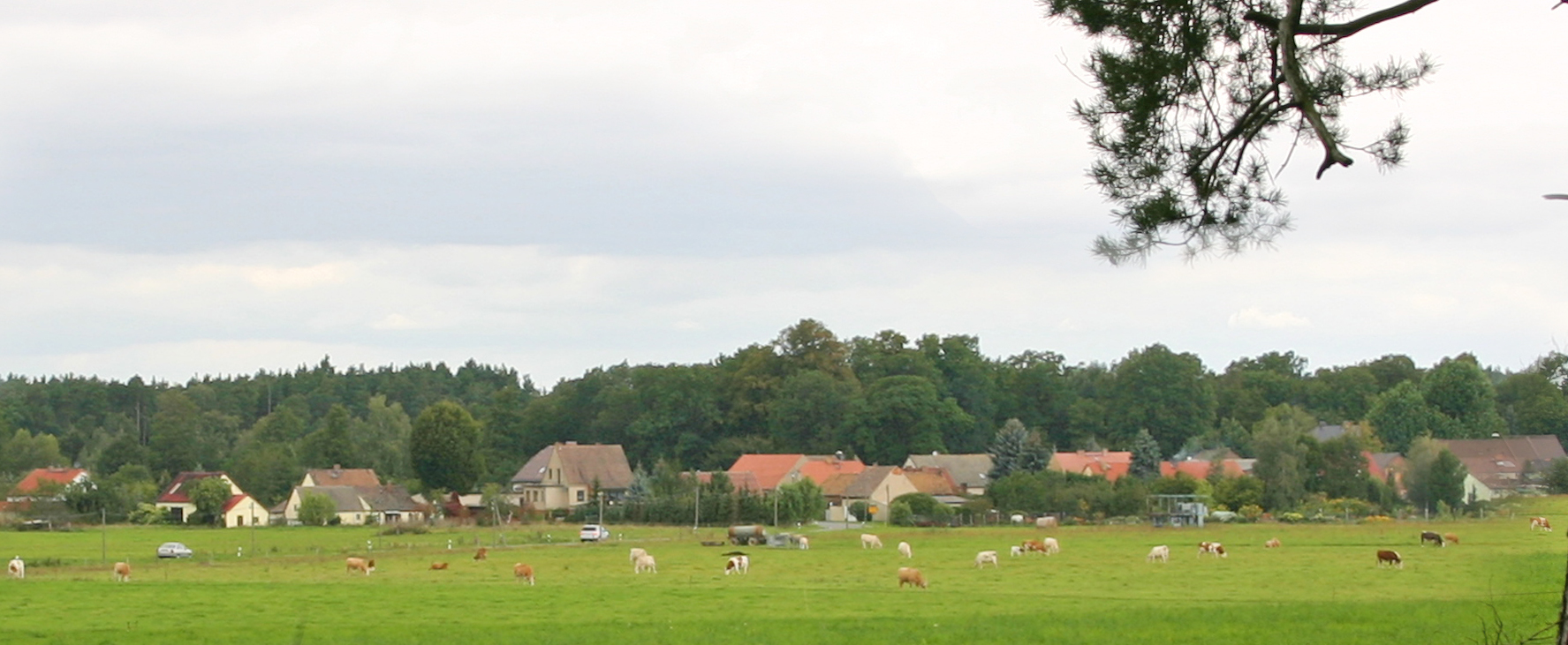 Ortslage